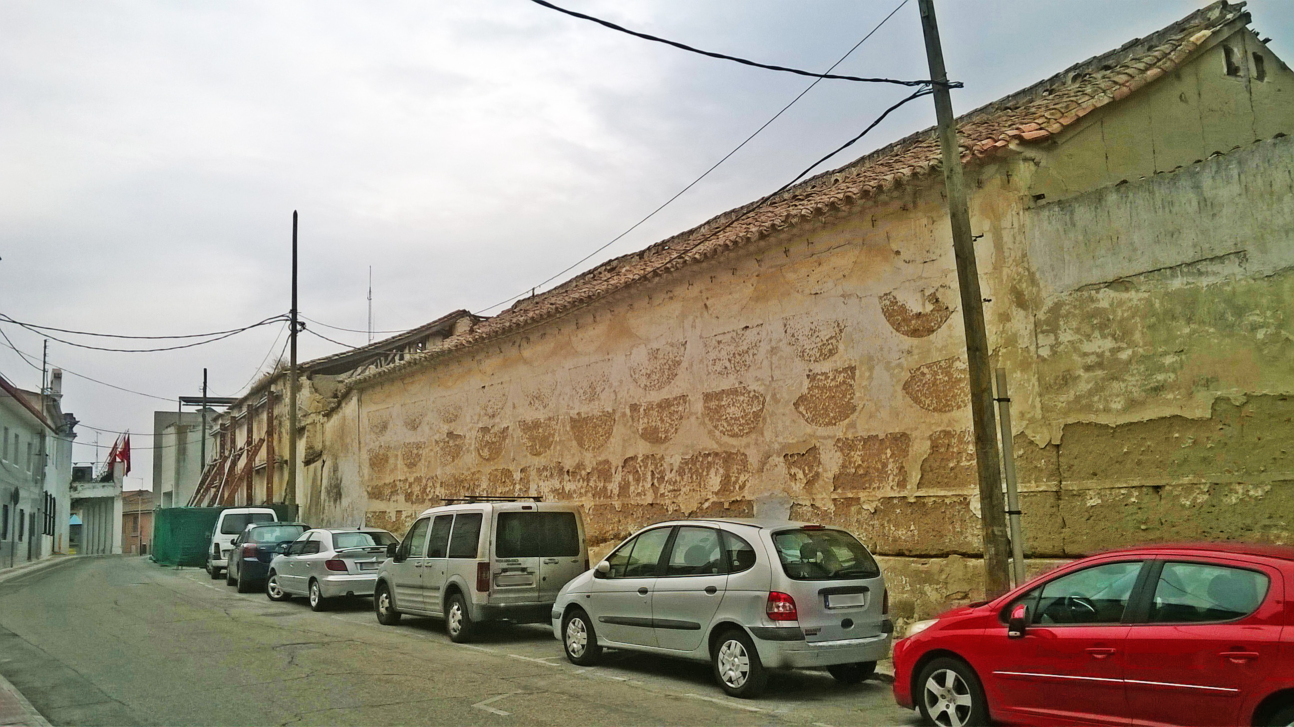 Casa de Bartolomé Hurtado del siglo XVII en el lateral se ubicaba el Corral